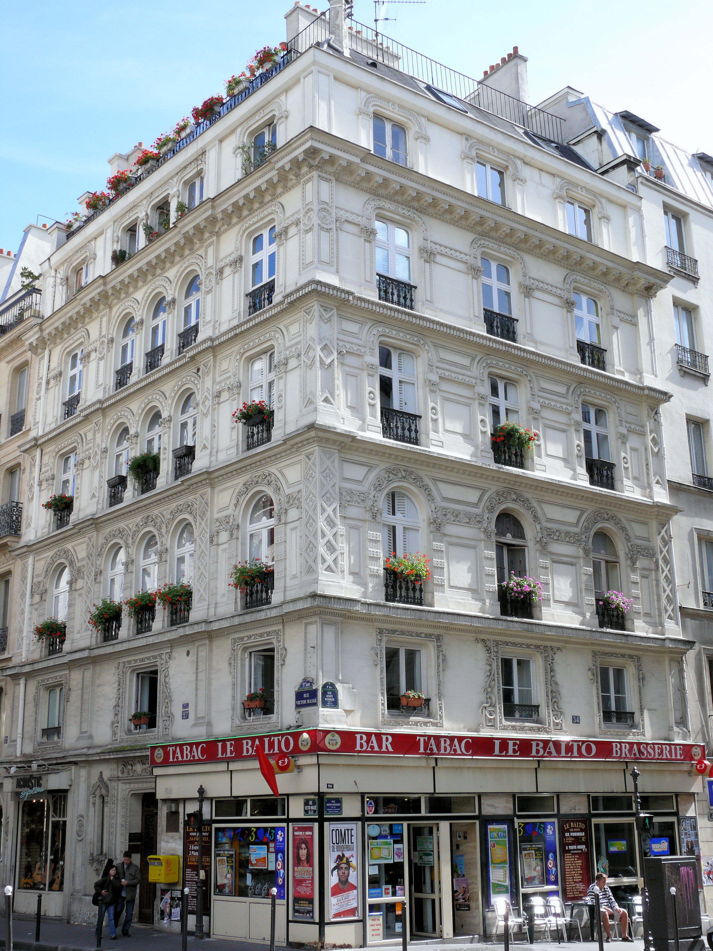 Paris 9ème arrondissement - Immeuble 27 rue Victor-Massé